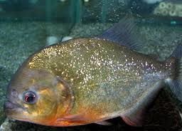 Yo tengo una y le saque foto y la subi y esta en cautiverio.